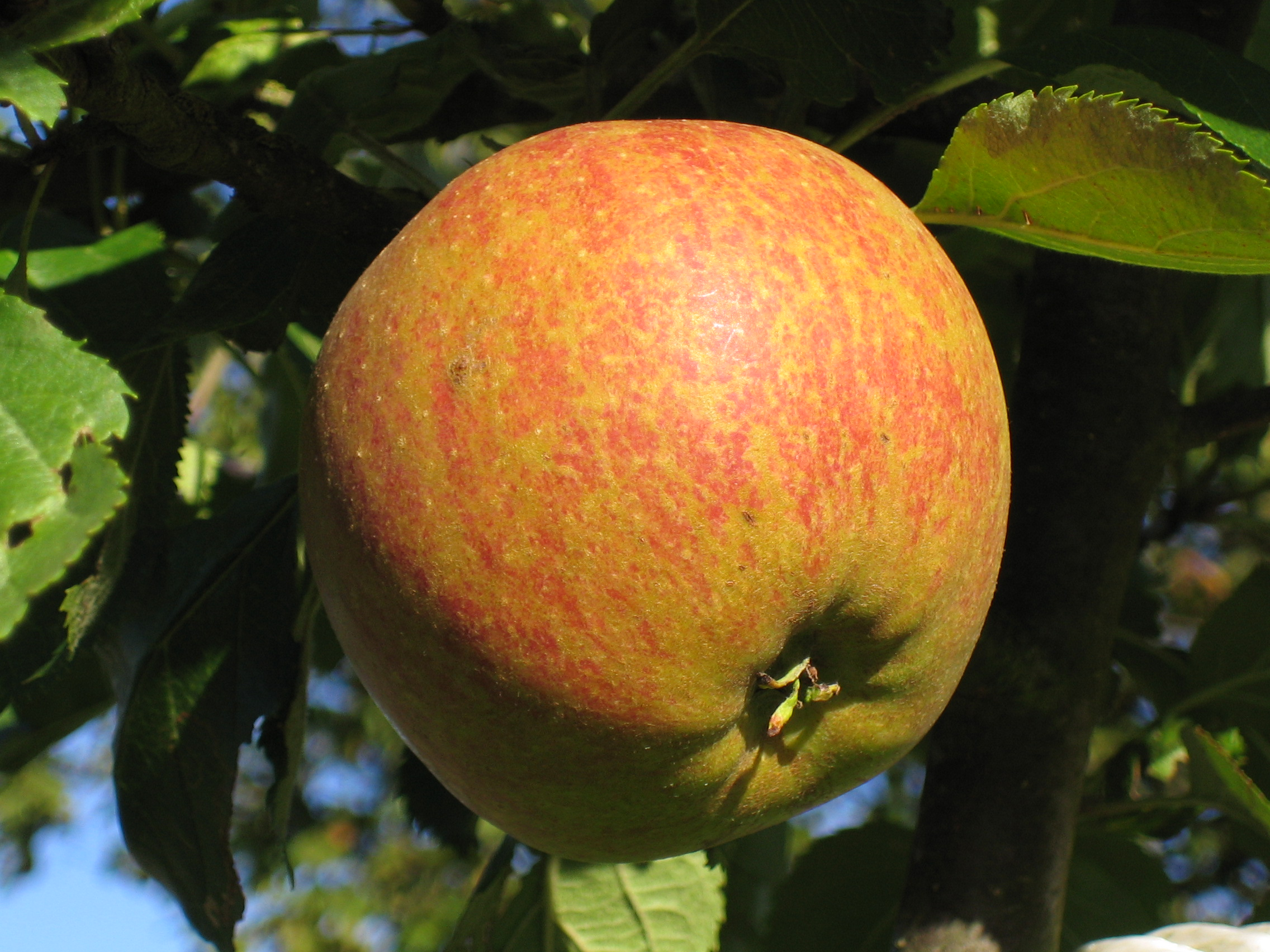 cox orange renette cox orange renette